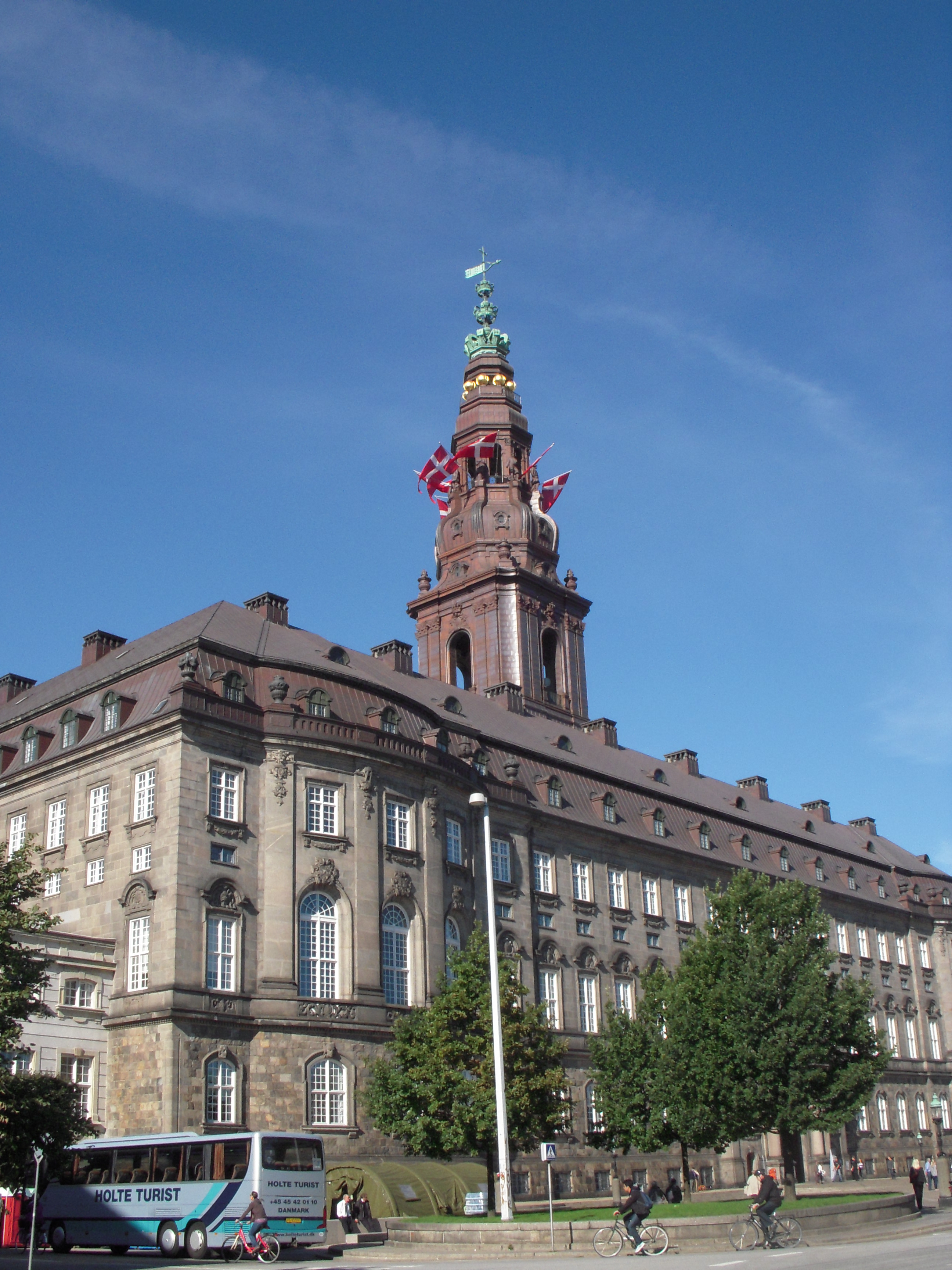 Christiansborg Slot på flagdagen for udsendte soldater. 5. september 2010.